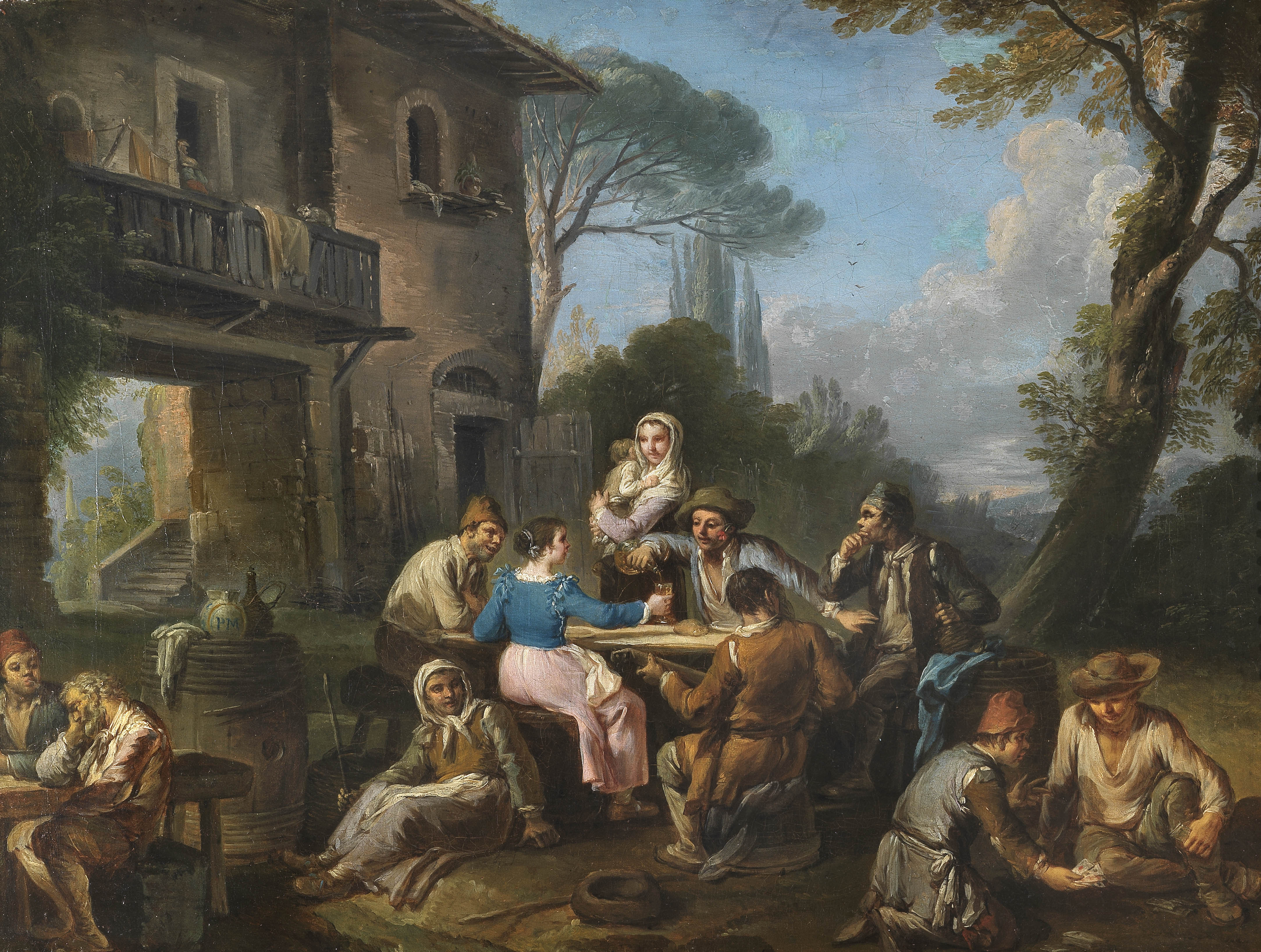 Bambocciata, Festa di contadini nella campagna romana, Collezione Mainetti (Roma)title QS:P1476,it:"Bambocciata, Festa di contadini nella campagna romana, Collezione Mainetti (Roma)" label QS:Lit,"Bambocciata, Festa di contadini nella campagna romana, Collezione Mainetti (Roma)"